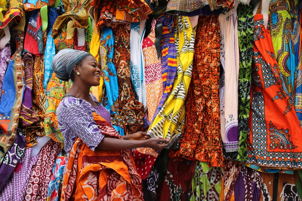 Textilhändlerin präsentiert ihre bunten Stoffe in Togo